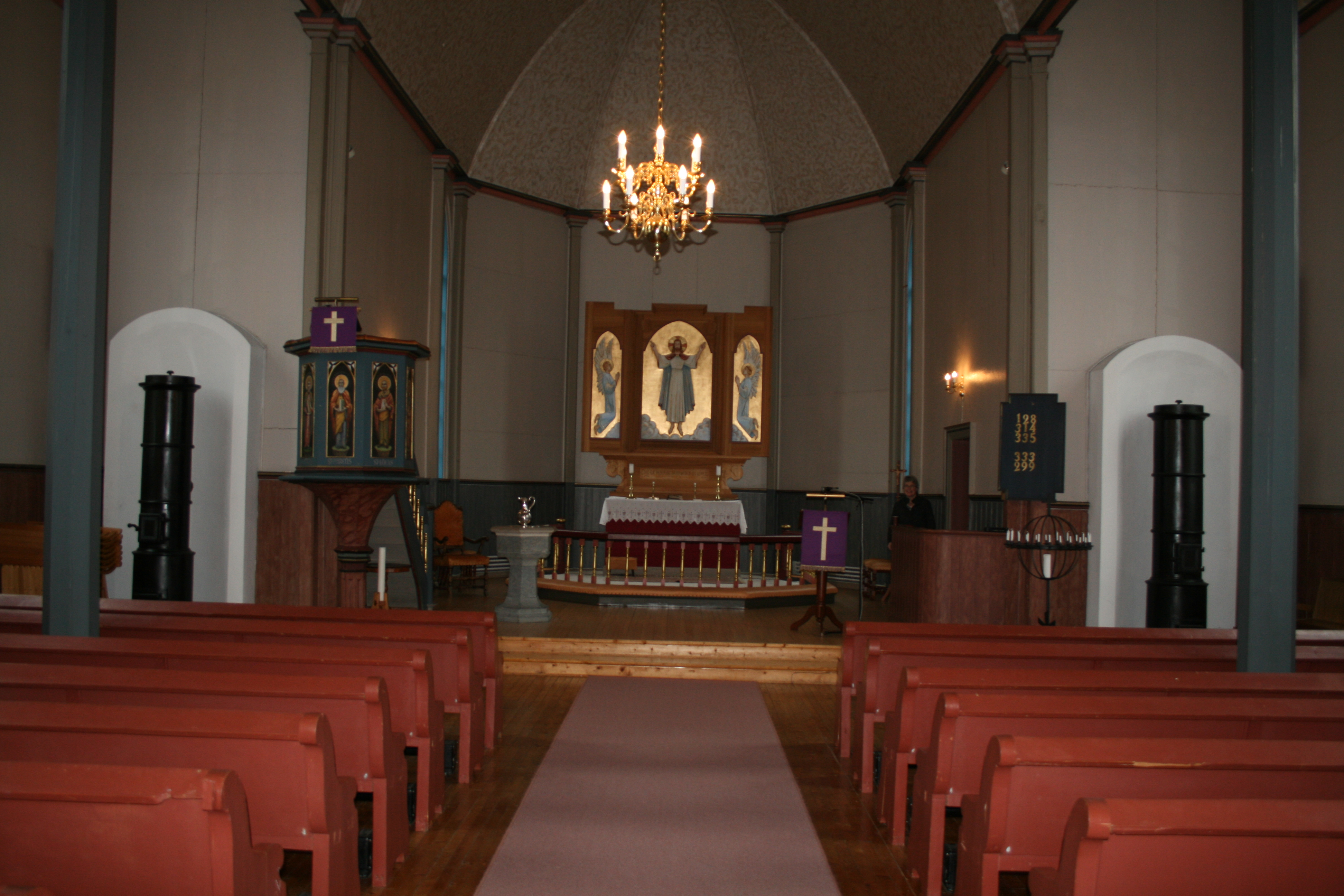 Nes kirke i Bjugn, Sør-Trøndelag, Norway